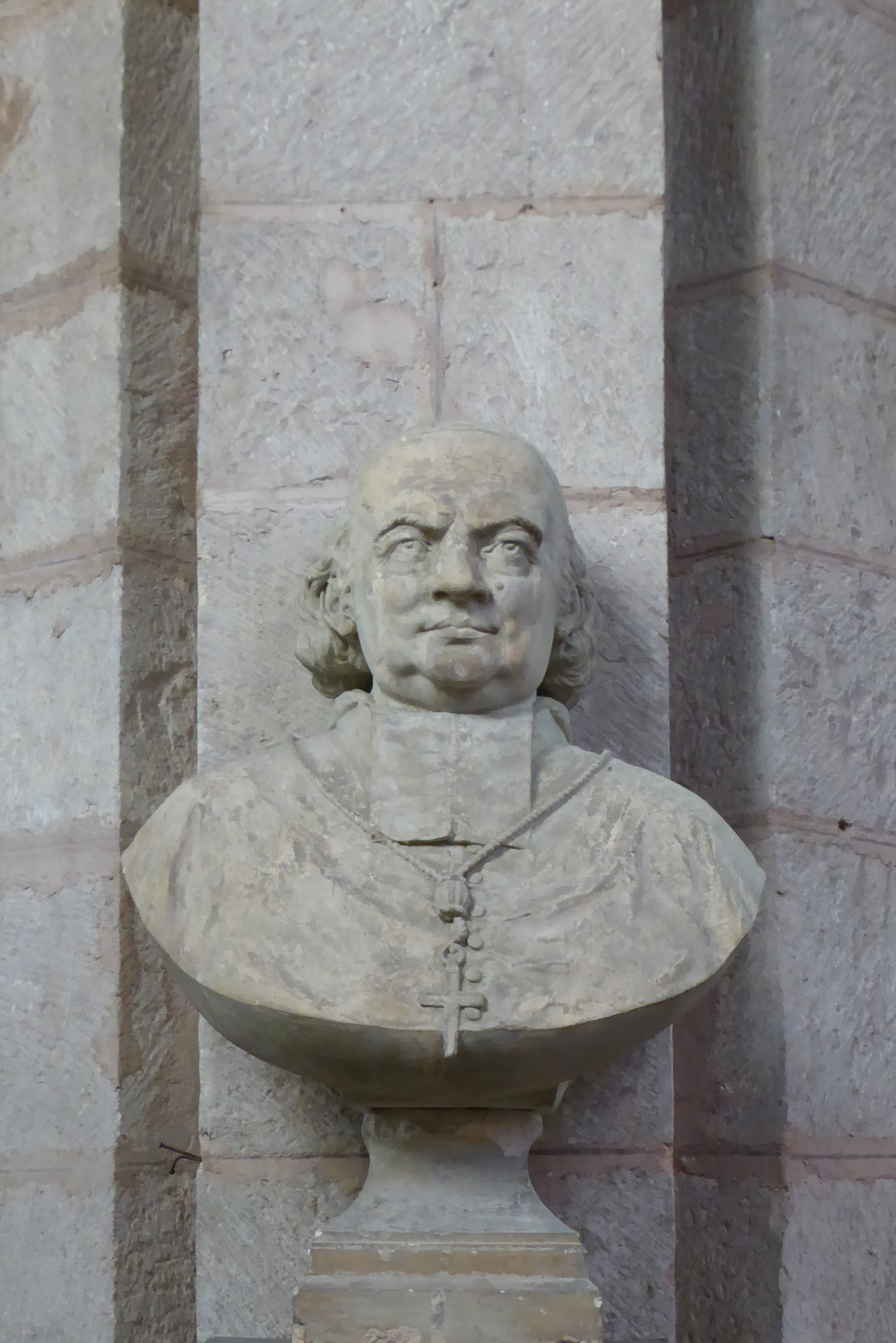 Buste de Claude-Hippolyte Clausel de Montals, église Notre-Dame de Bonneval, Eure-et-Loir, France.